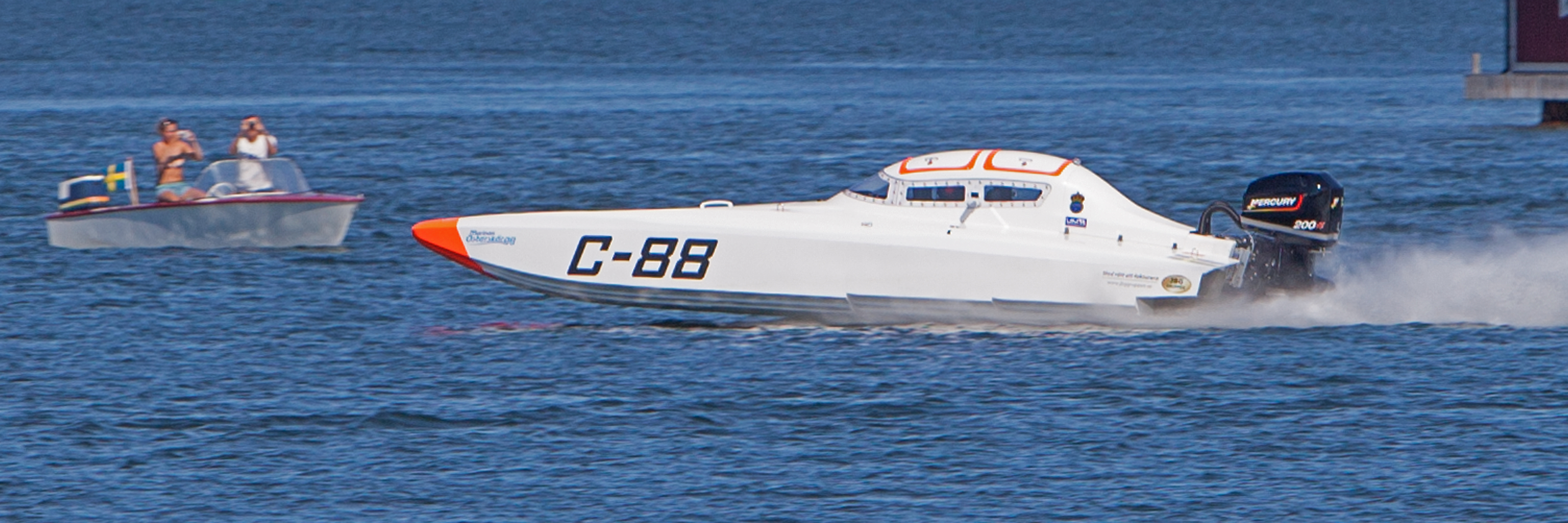 Roslagsloppet 2013